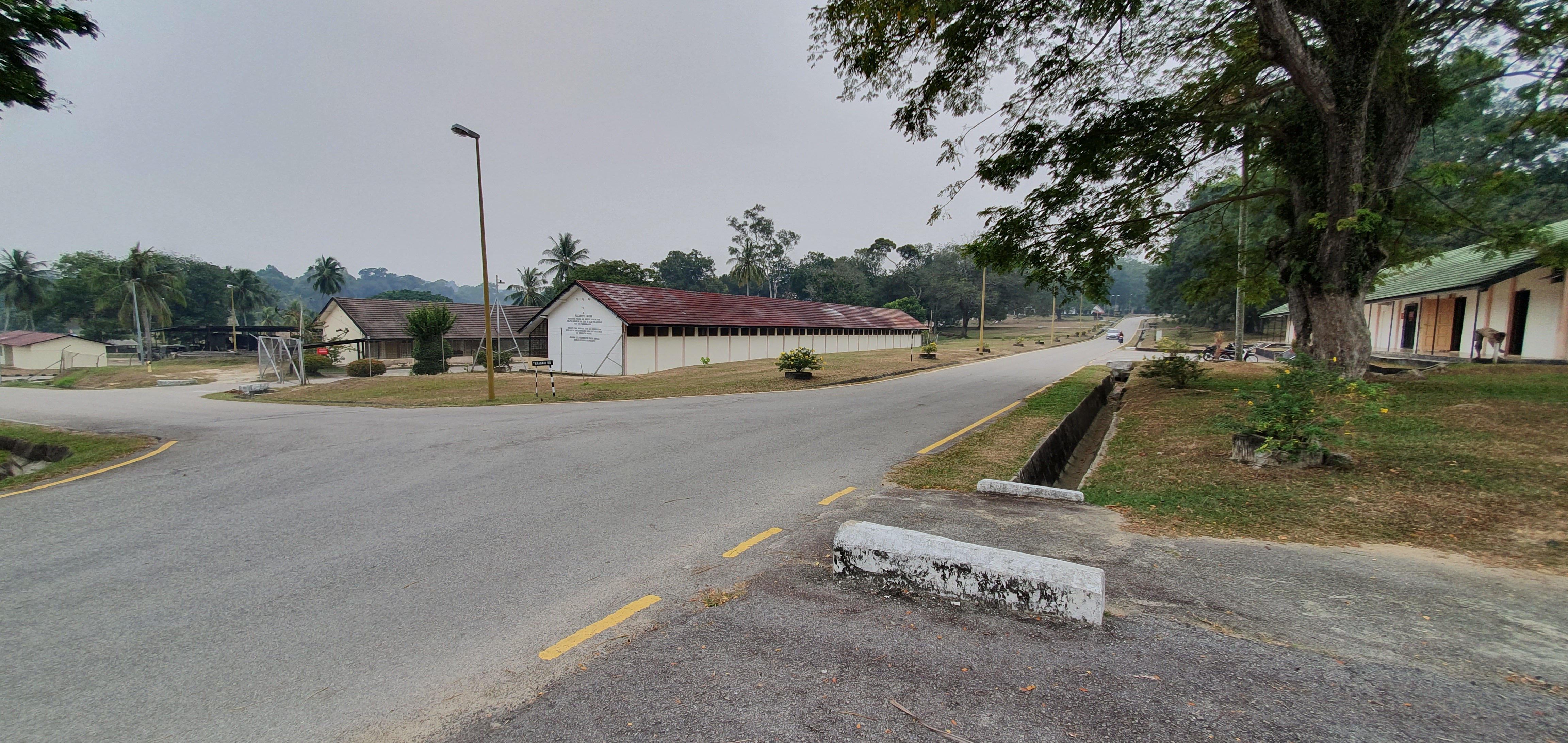 Jalan antara jalan menuju ke MT dan berhadapan dengan Pl Semboyan